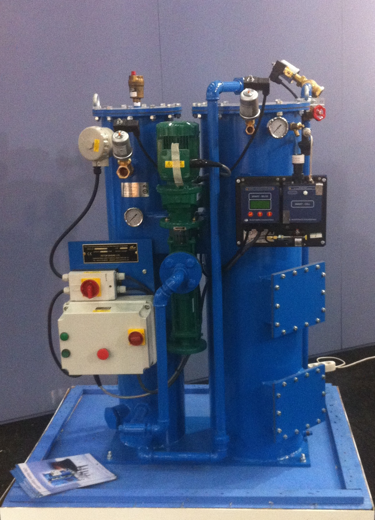 Gezien op Europort 2013 in Ahoy Rotterdam